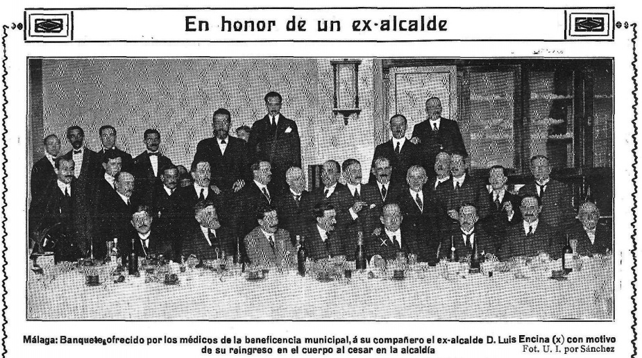 Málaga: Banquete ofrecido por los médicos de la beneficencia municipal, a su compañero el ex-alcalde D.Luis Encina (x) con motivo de su reingreso en el cuerpo al cesar en la alcaldía. 1916